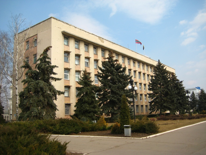 Здание государственной администрации г. Бендеры